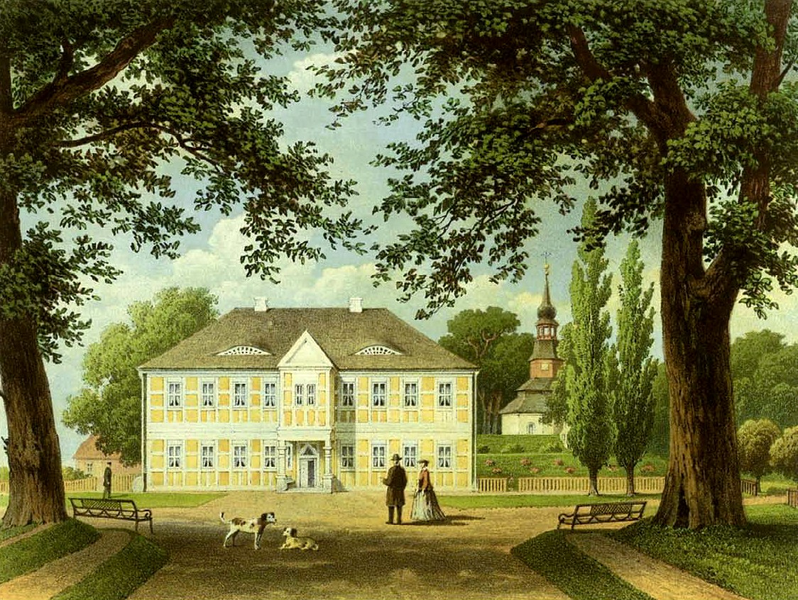 Rittergut PustowKreis Grimmen, Provinz Pommern